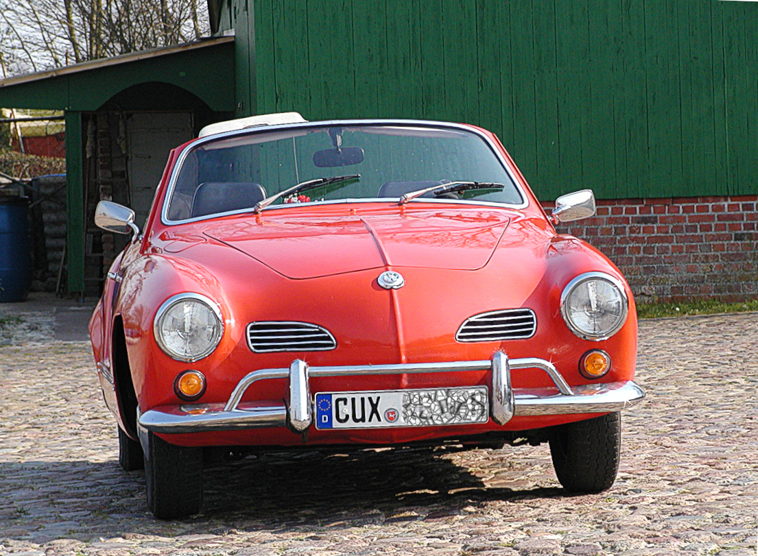 Ein Karmann Ghia in rot